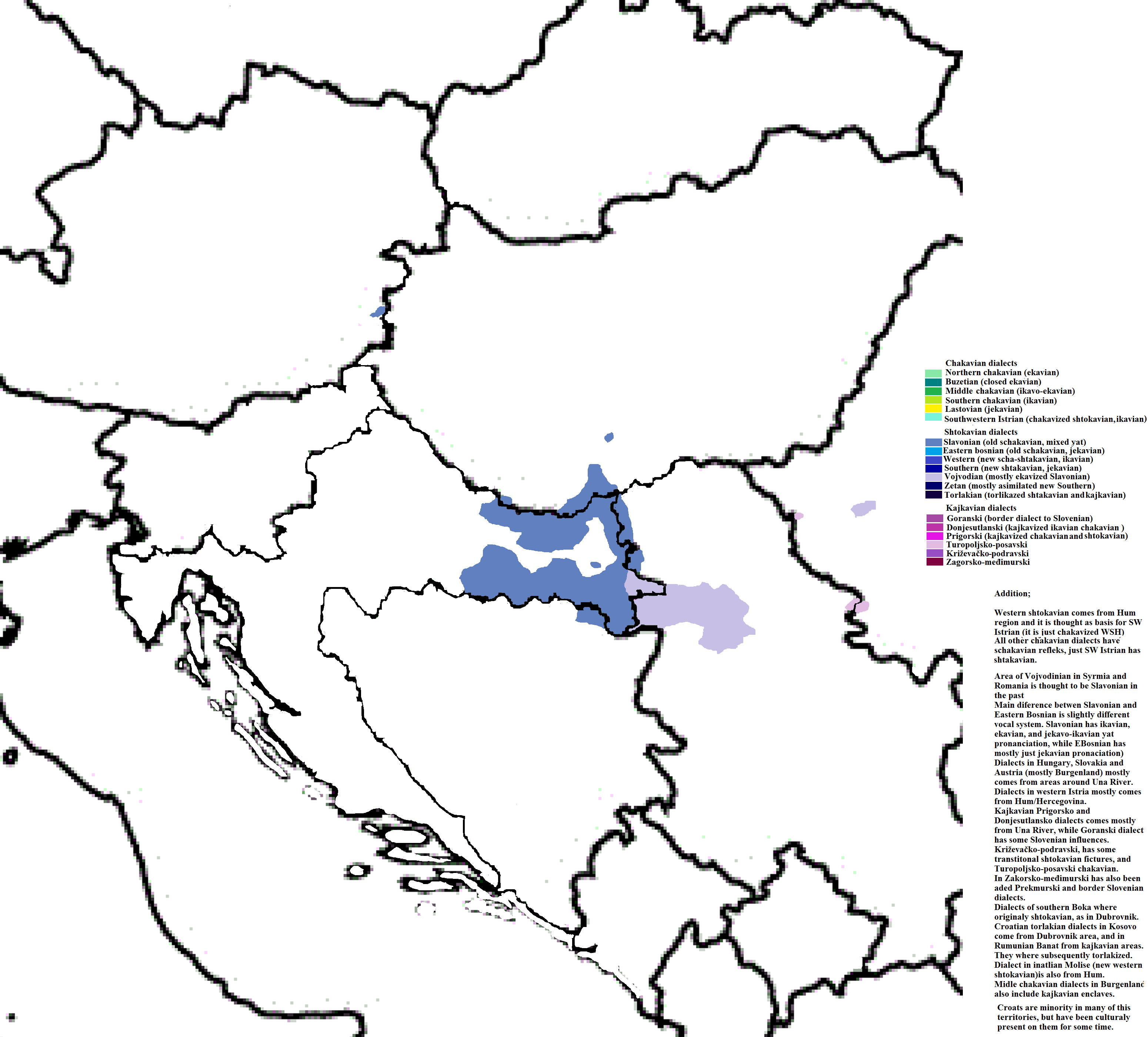 Slavonski i i povezani dijalekti; štokavizirane enklave i područja koja su nekoć bila slavonska na istoku (Srbija, Rumunjska)